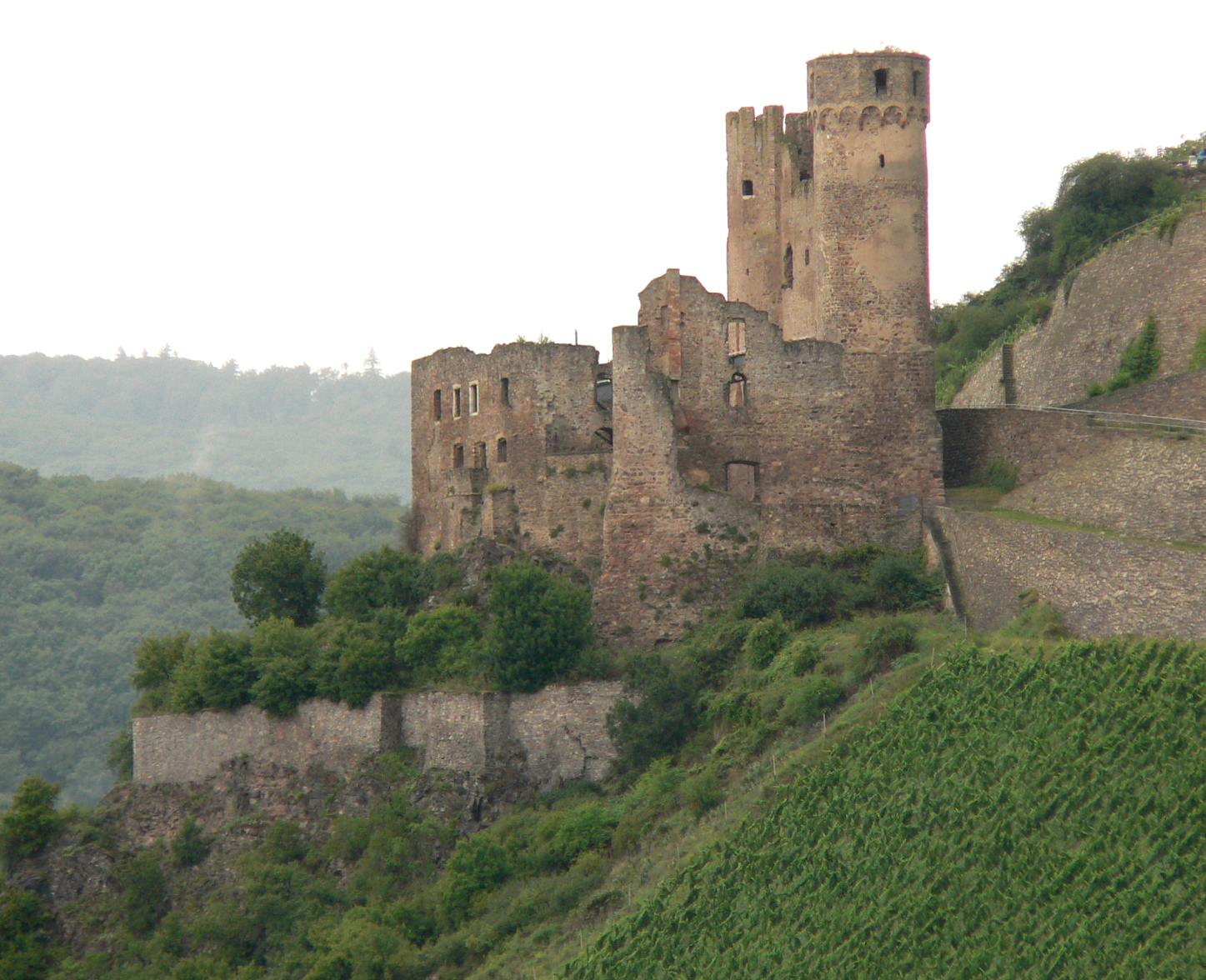 Burg Ehrenfels